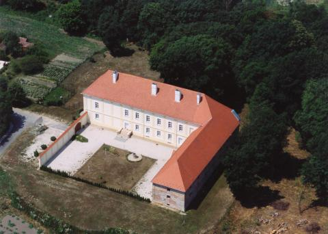 Szécsisziget, Hungary, aerialphotography (Szapáry Mansion)